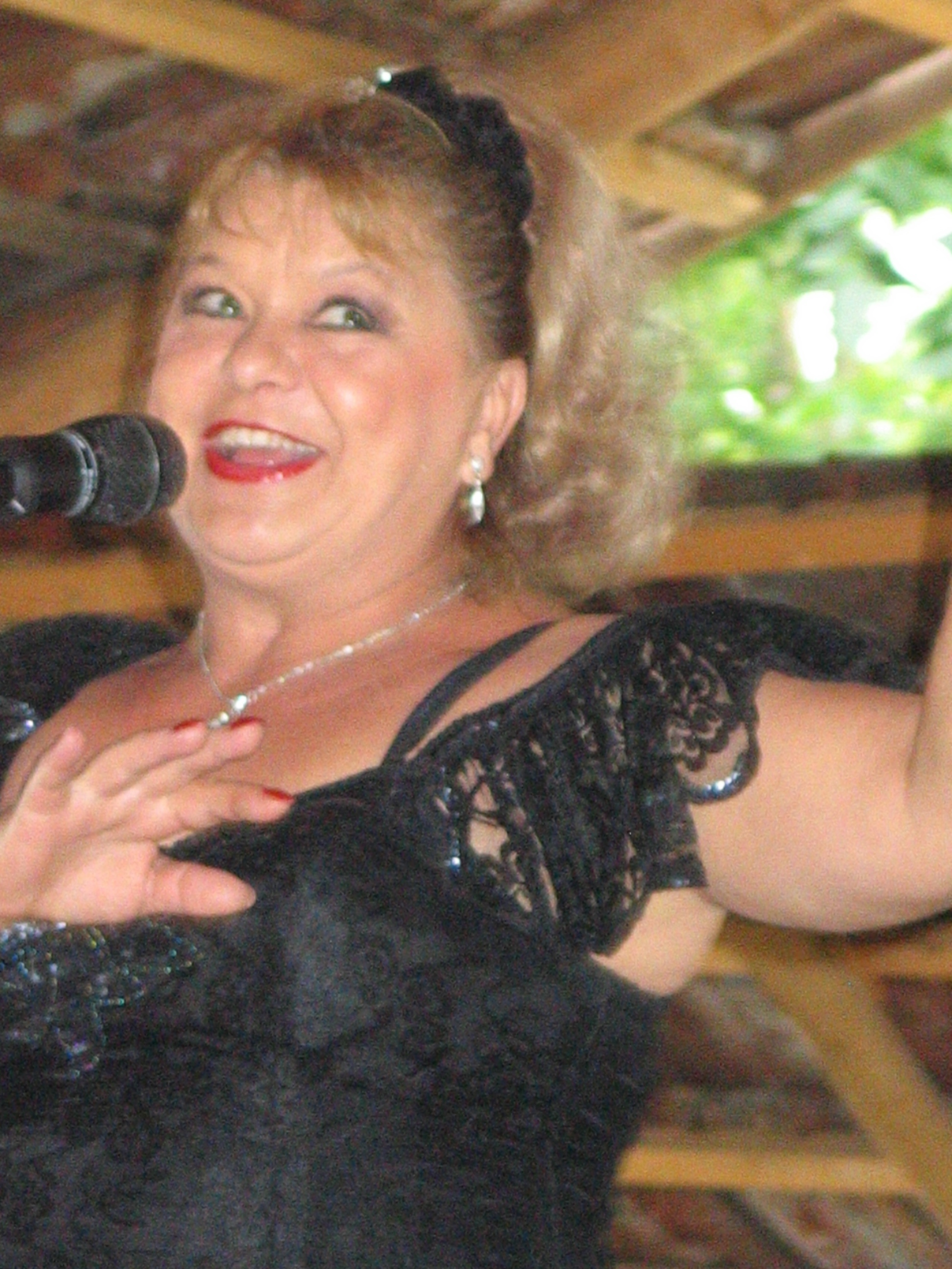 Oszvald Marika magyar színésznő, operetténekes, a Halhatatlanok Társulatának örökös tagja